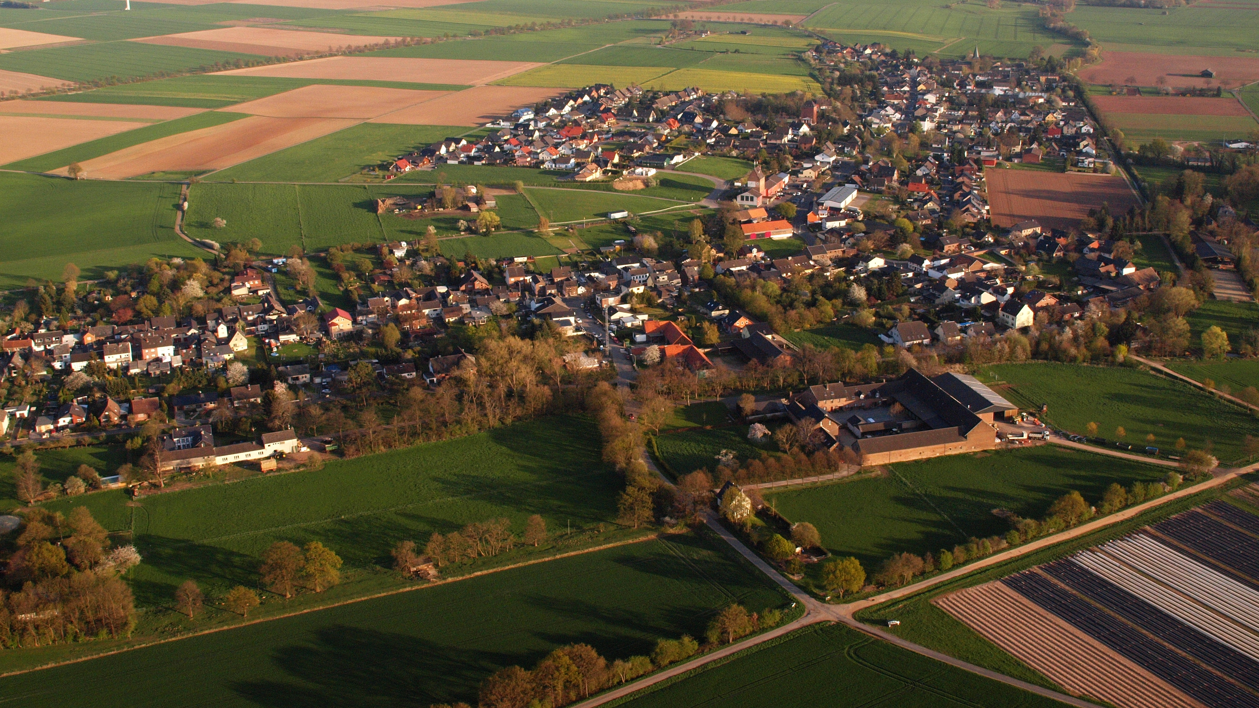 Mülheim (Zülpich), Luftaufnahme (2015)